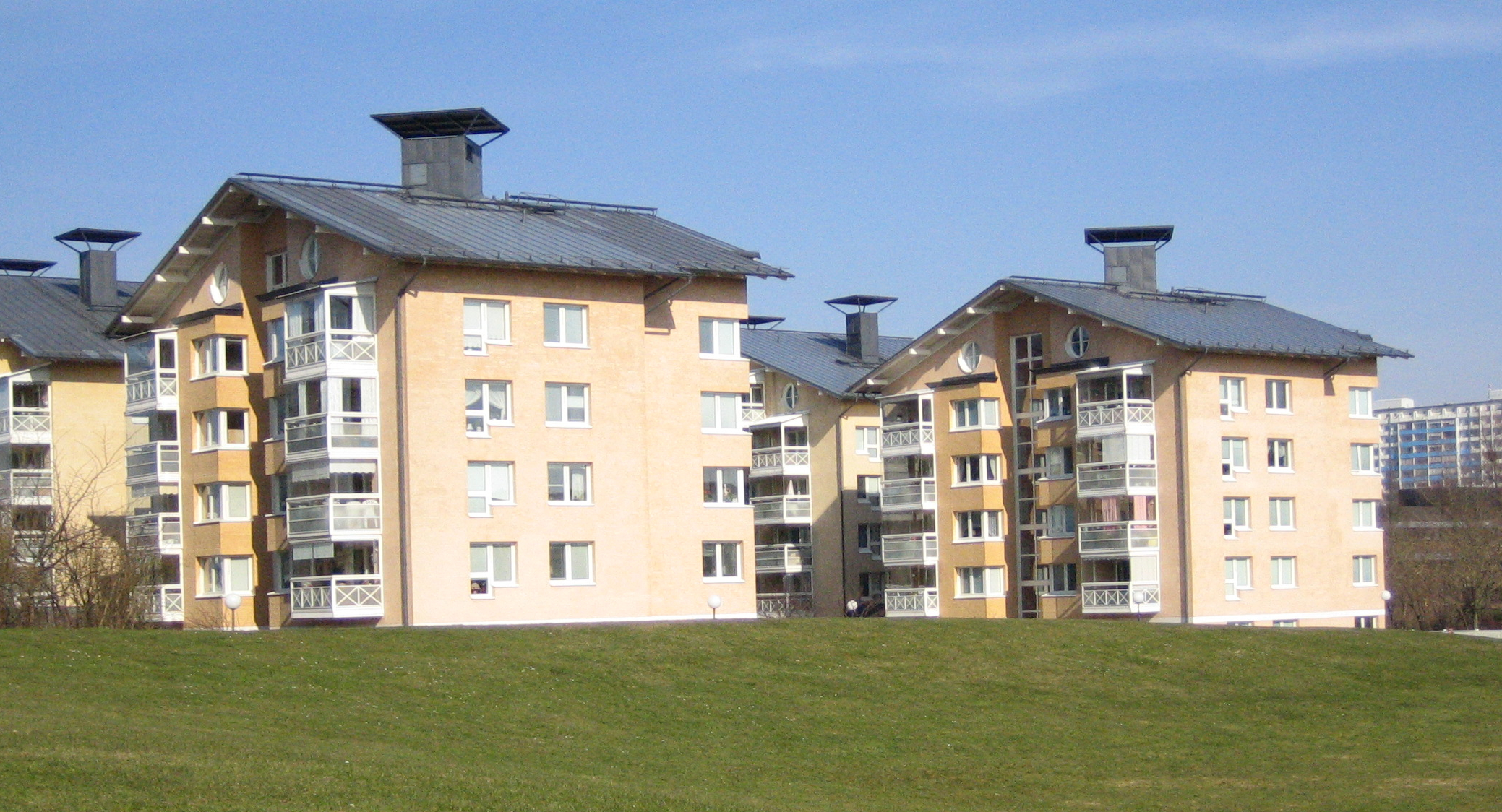 Bellevue Park in Malmö, Sweden